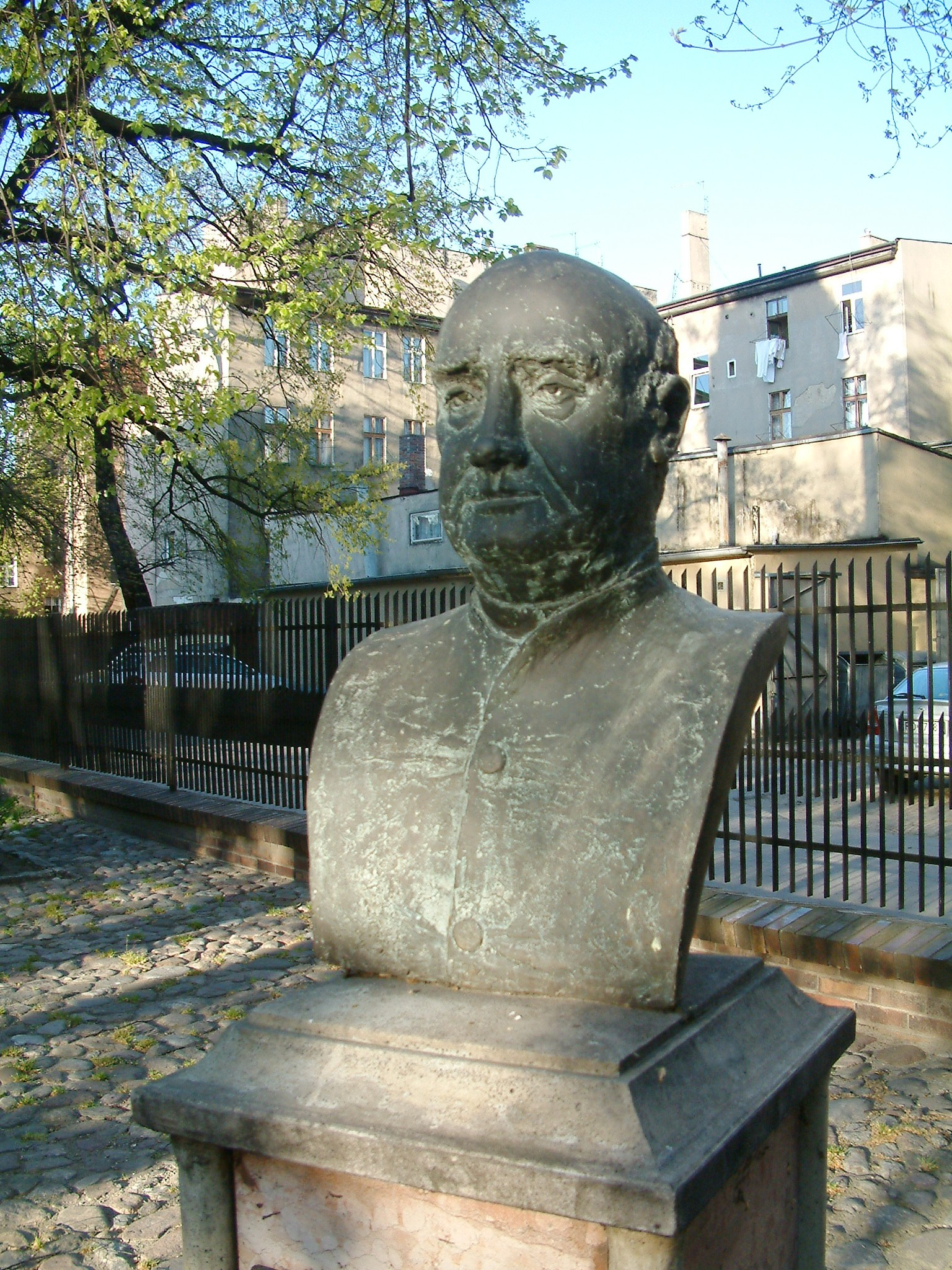 Monument of Father Augustyn Szamarzewski in Poznań